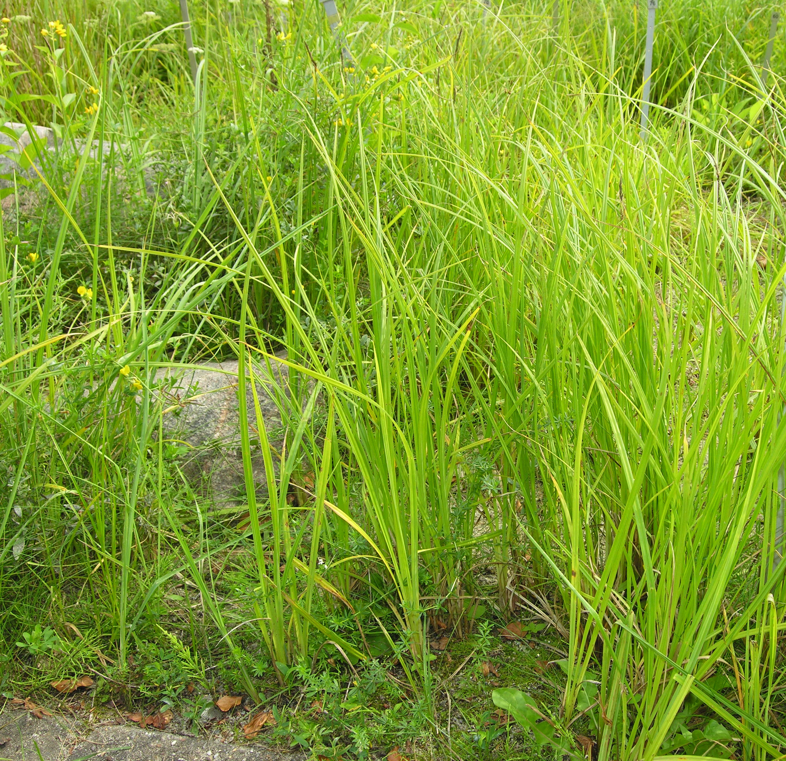 Carex acuta